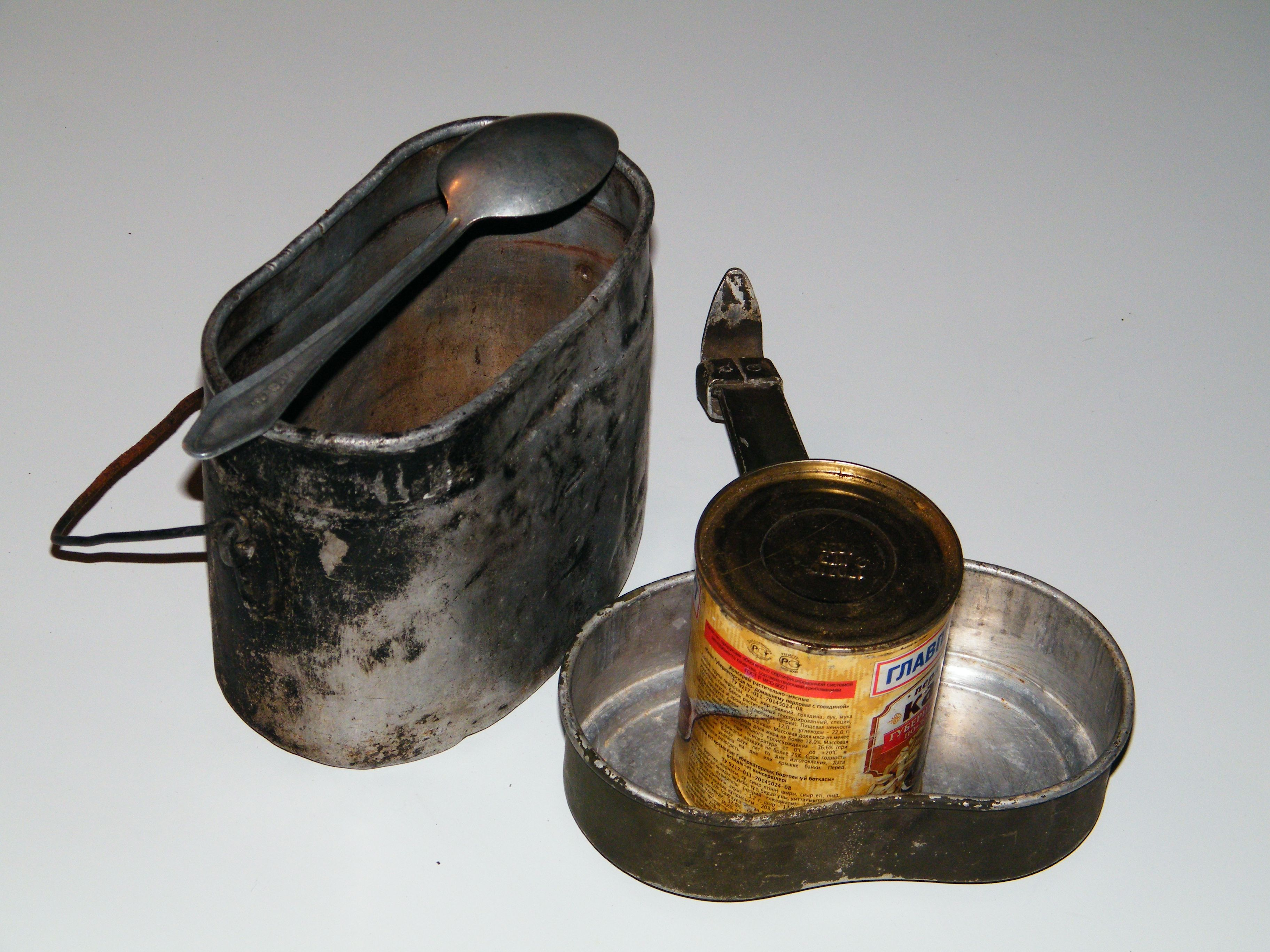 Котелок с ложкой